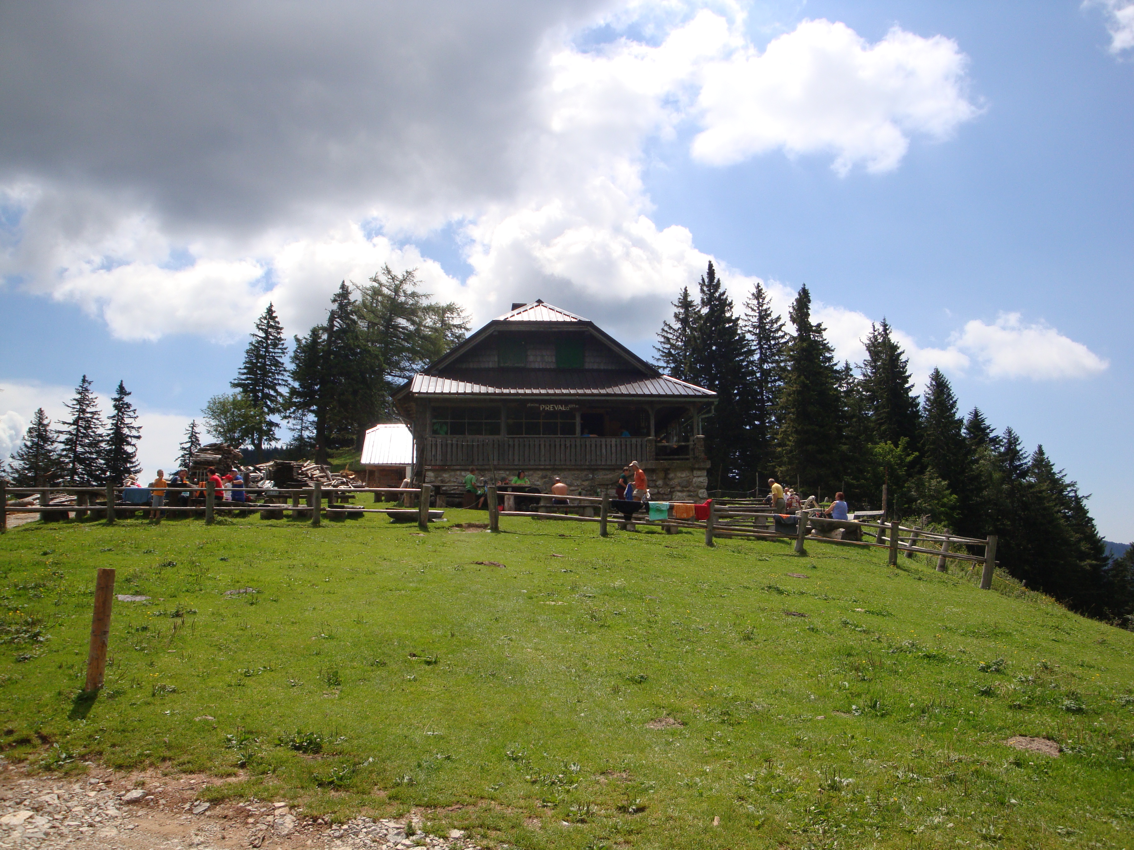 Koča na planini Prevala